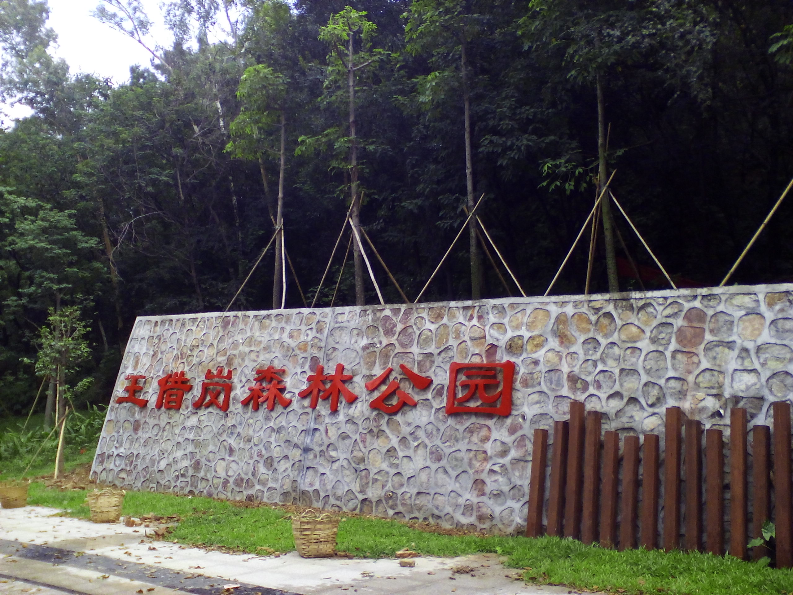 Wangjiegang Park in Chancheng District, Guangdong Province, China